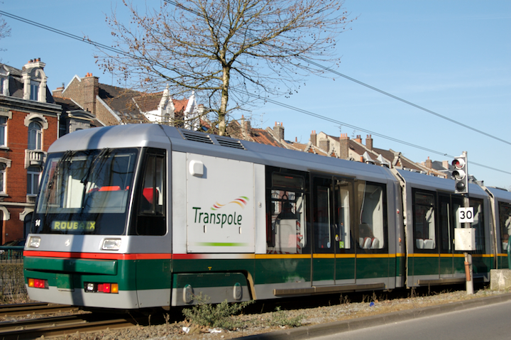 Le tramway à Marcq-en-baroeul